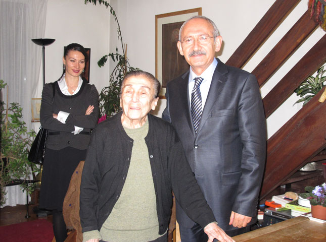 Photo de la femme de lettres turque Güzin Dino, au centre, à Paris, deux ans avant sa mort